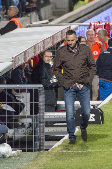 Jean-Luc Vannuchi durant le Match Nîmes-Auxerre